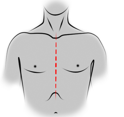 Cicatrice de sternotomie médiane : abord chirurgical du médiastin antérieur